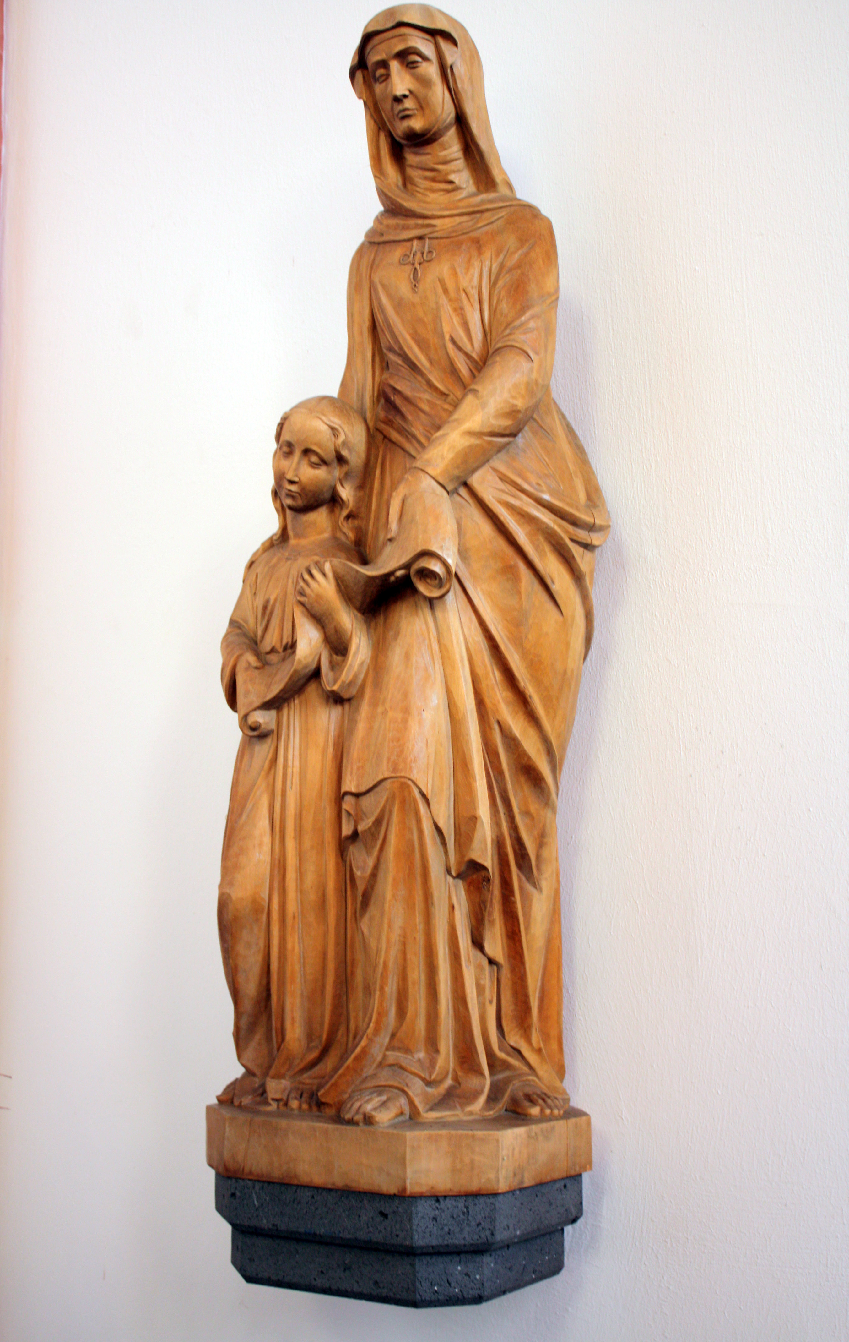 Köln-Lindenthal, Skulptur in der Kapelle des St. Anna-Hauses